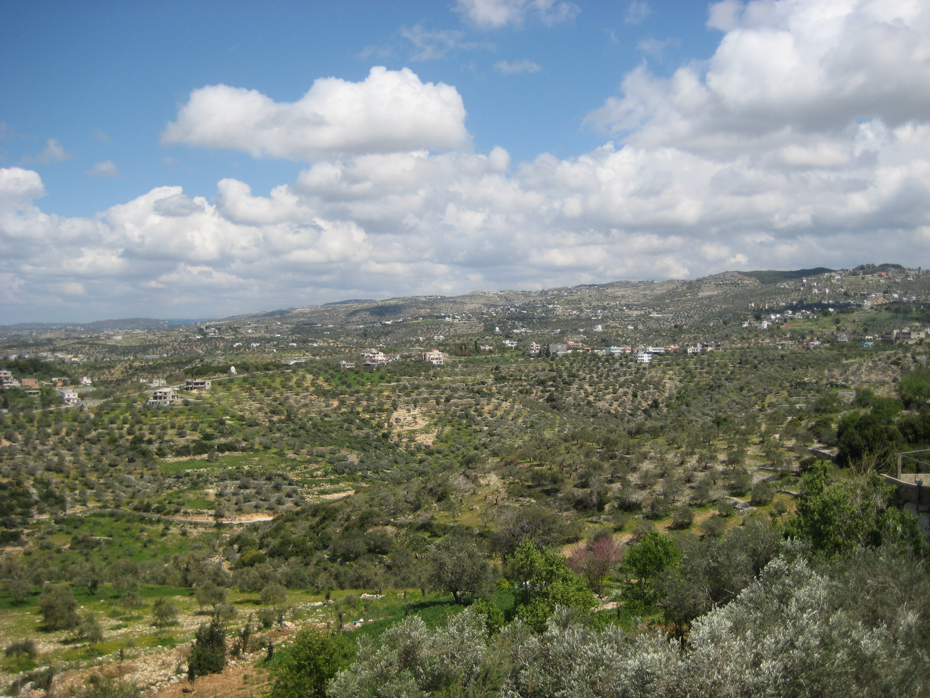 منظر الجبال الساحلية مأخوذ من العنازة.